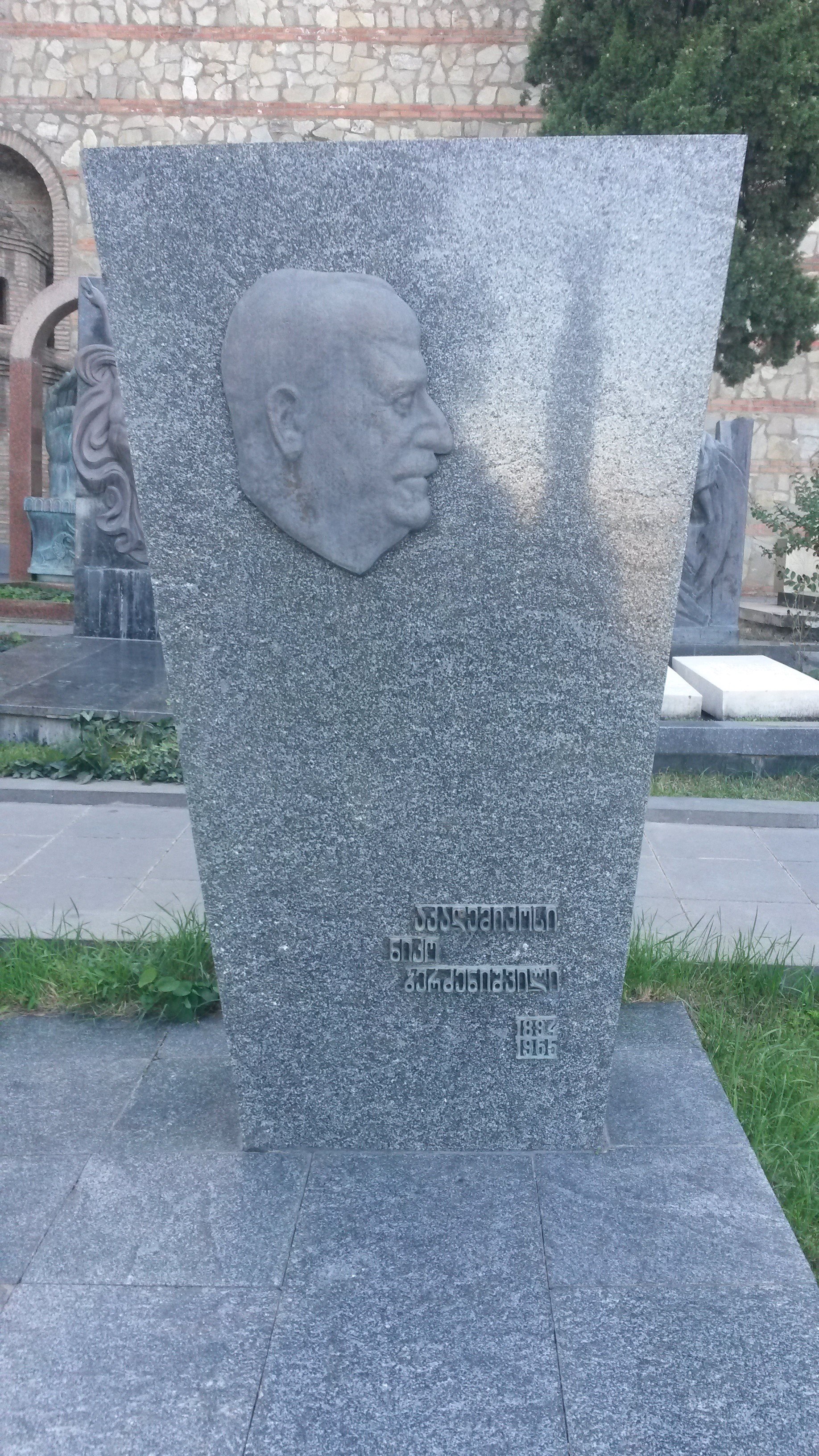 მთაწმინდის პანთეონი